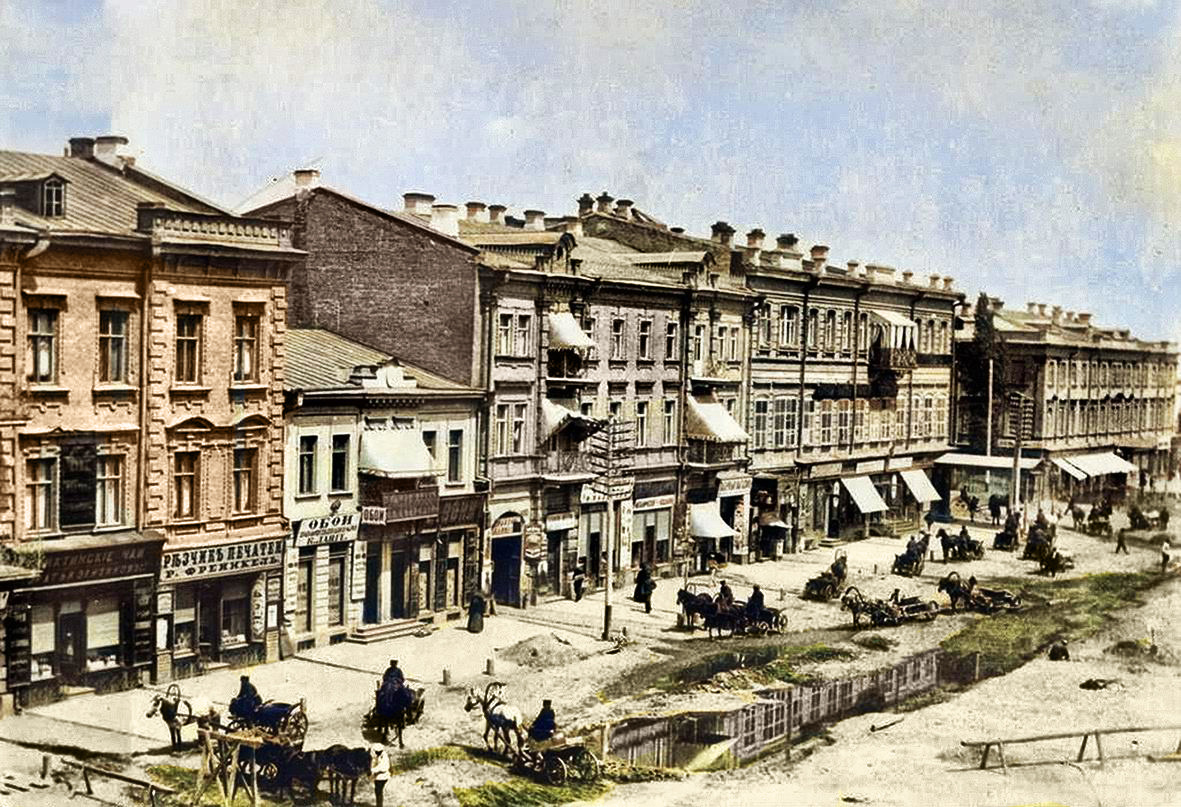 Парна ділянка Хрещатика до Трьохсвятительської вулиці